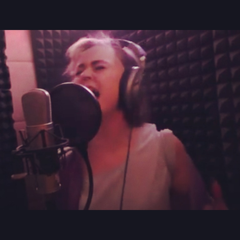 In Highlight Recordz Studios [IT]